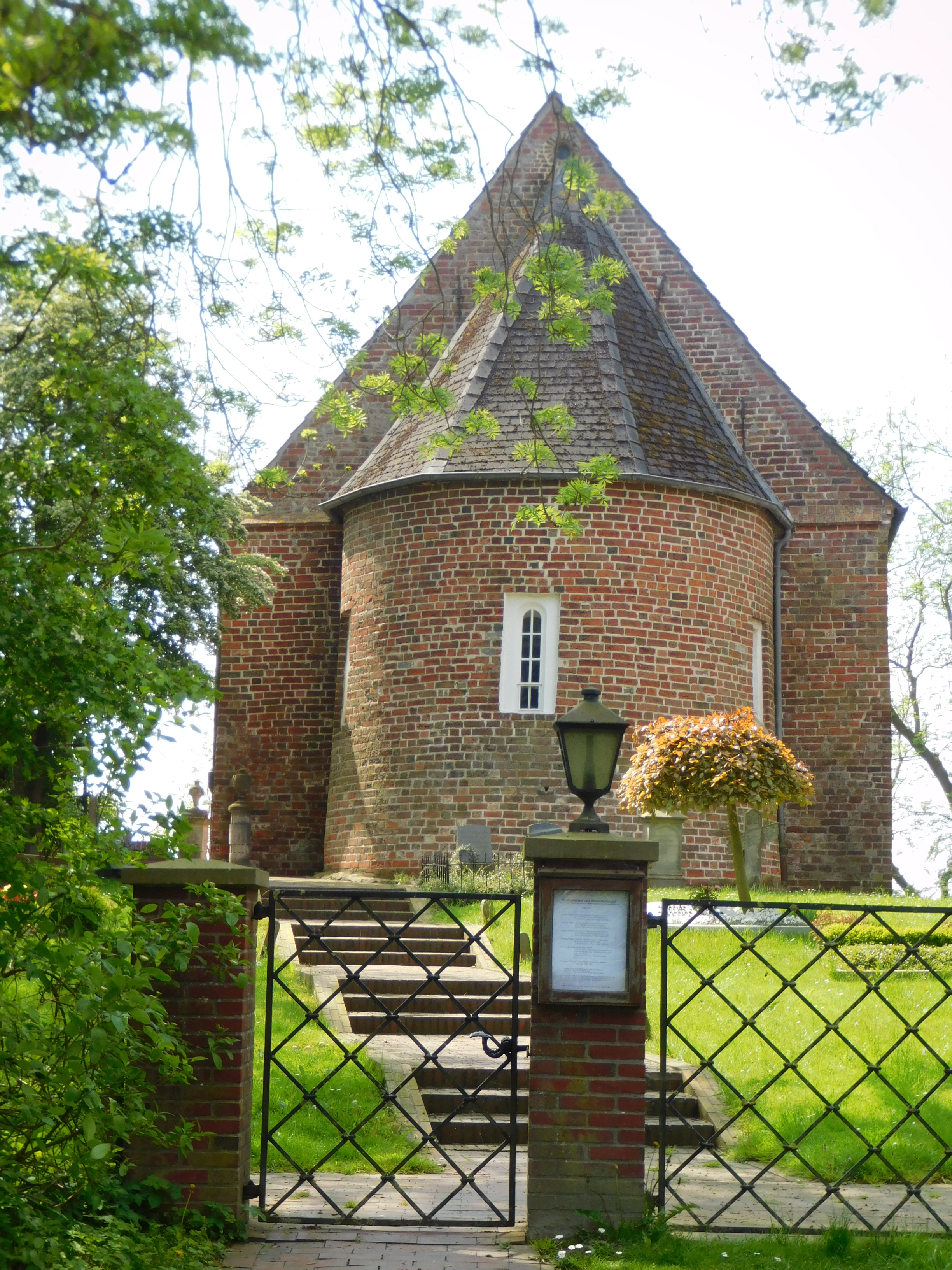 Ostgiebel und Apsis der evangelisch-lutherischen Kirche Wüppels